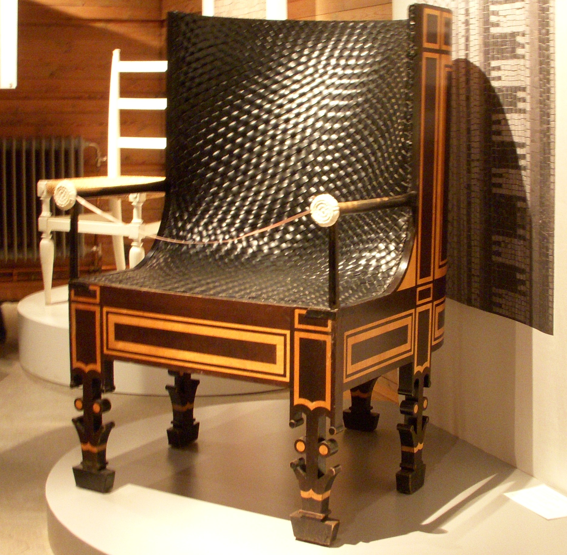 Sigurd Lewerentz länstol till Uppståndelsekapellets officiantrum på Skogskyrkogården i Stockholm